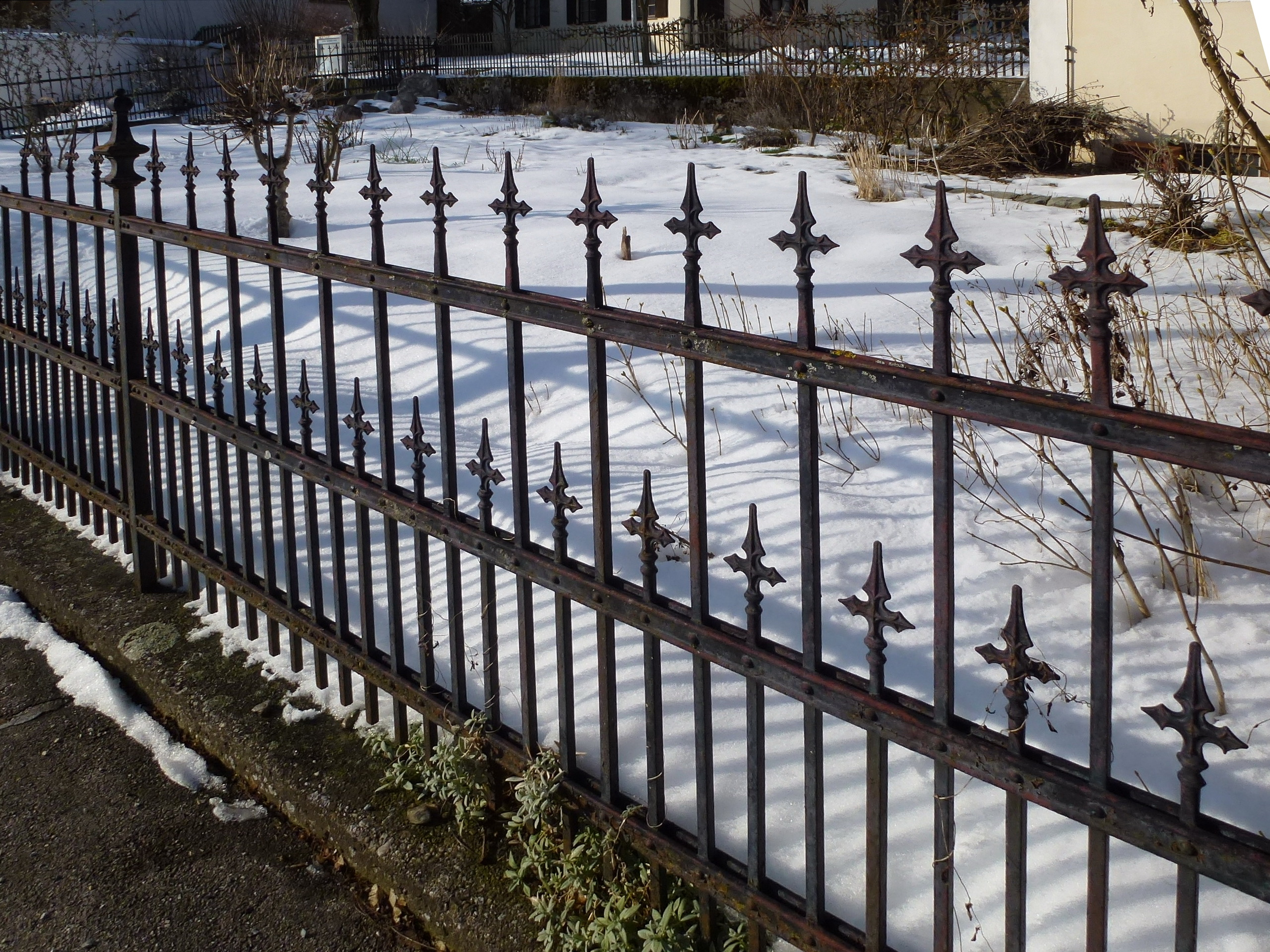 Ehemaliges Pfarrhaus Eching: Einfriedung mit Eisenzaun an der Garten-Südseite